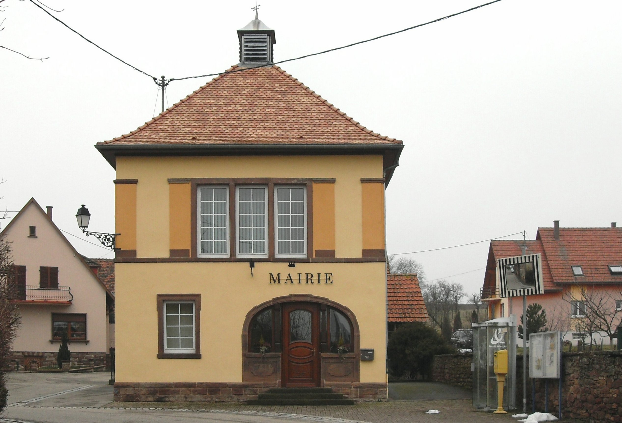 La mairie de Zehnacker